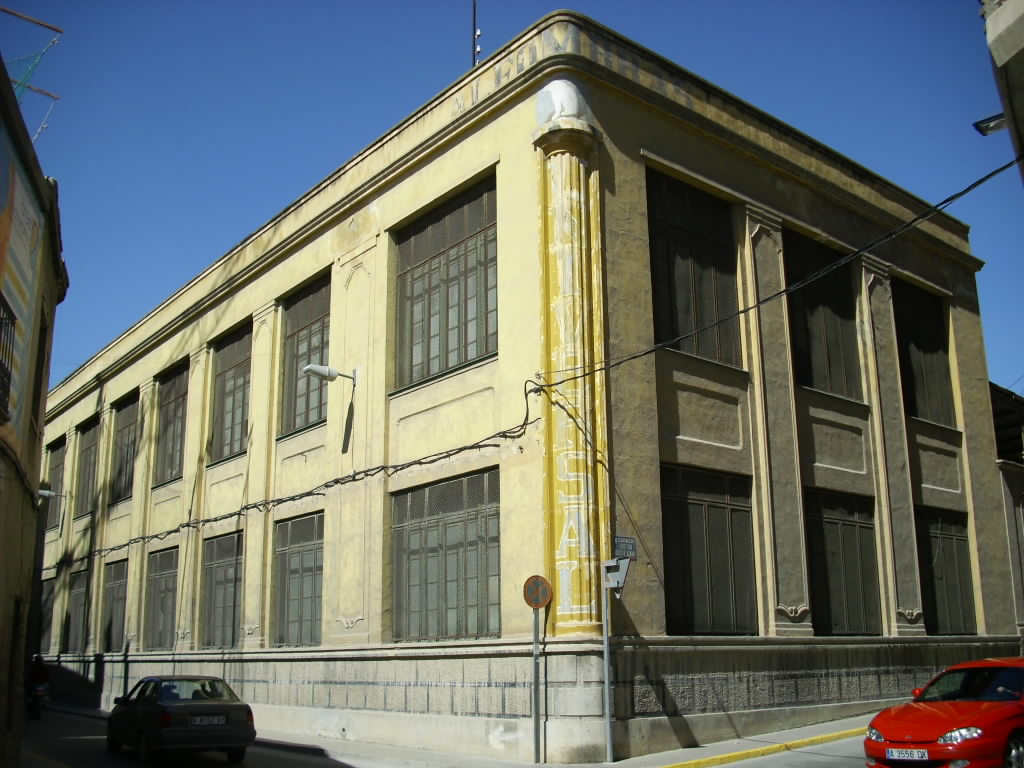 Fàbrica de catifes la Universal, Crevillent